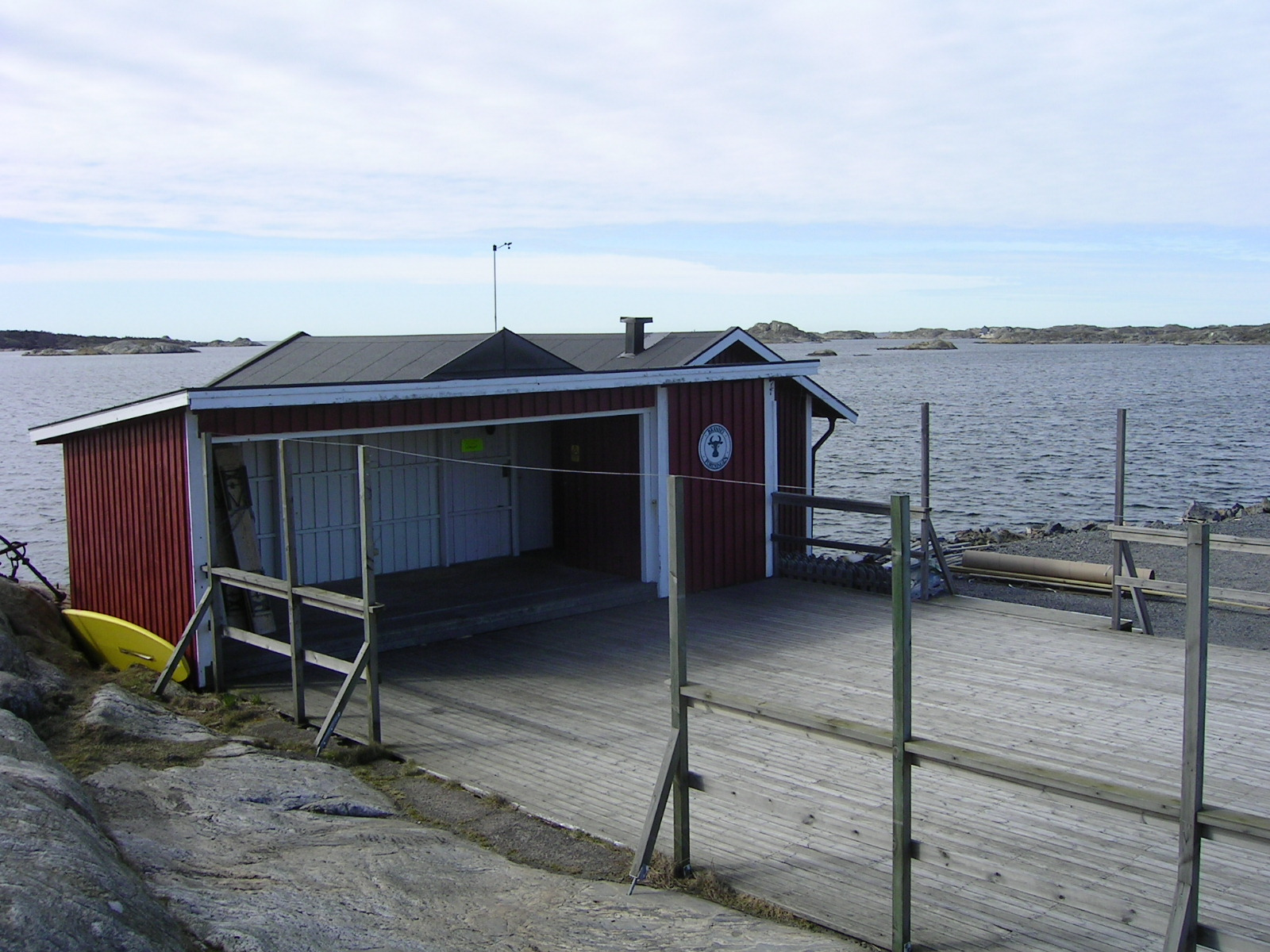 Dansbanan vid Brännö Husviks brygga.